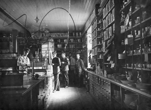 Fra samvirkelaget i Sulitjelma. 1913 SG.F.10009-1877